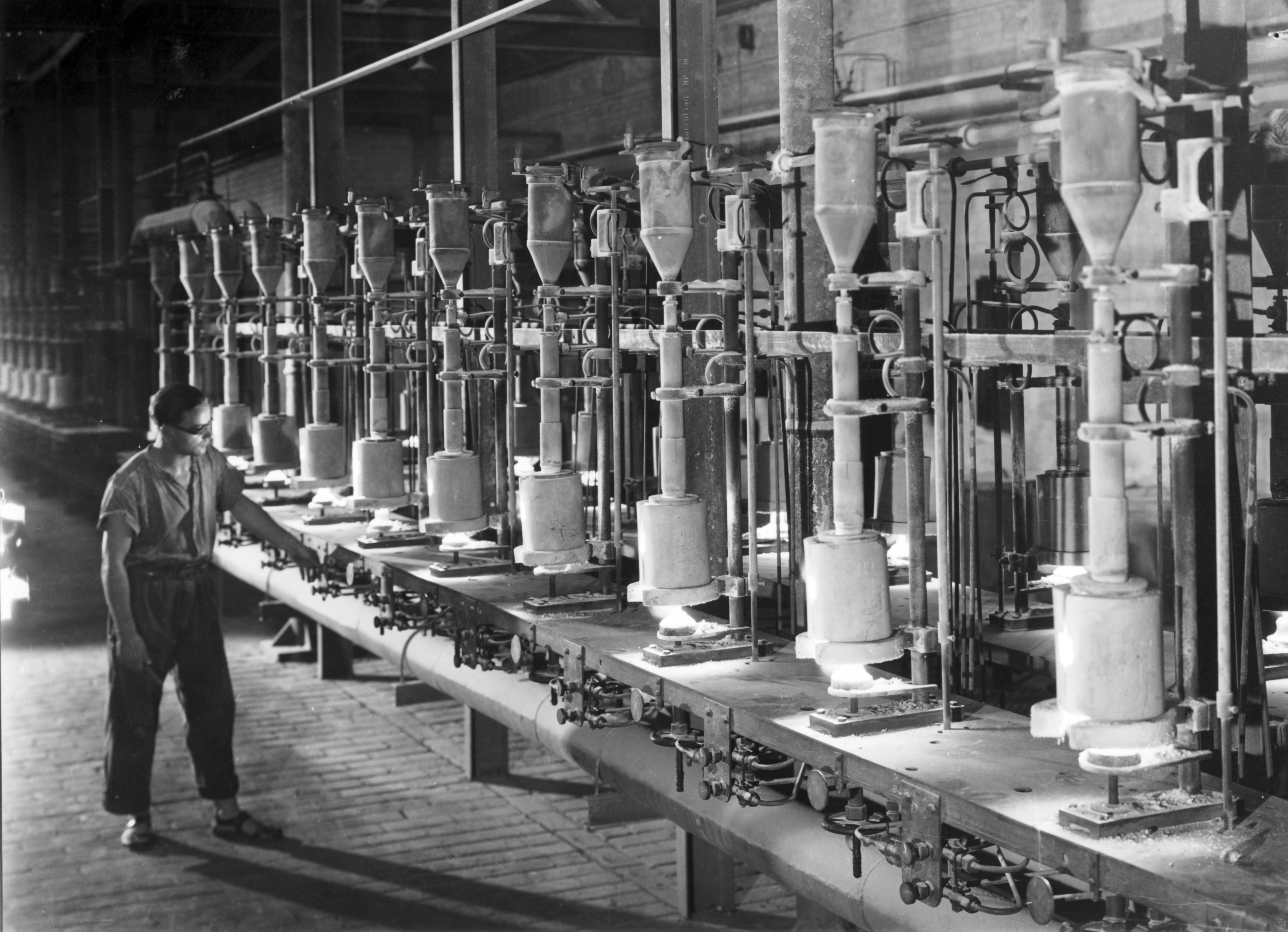 Verneuile-Apparaturen zur Herstellung synthetischer Edelsteine im EKB